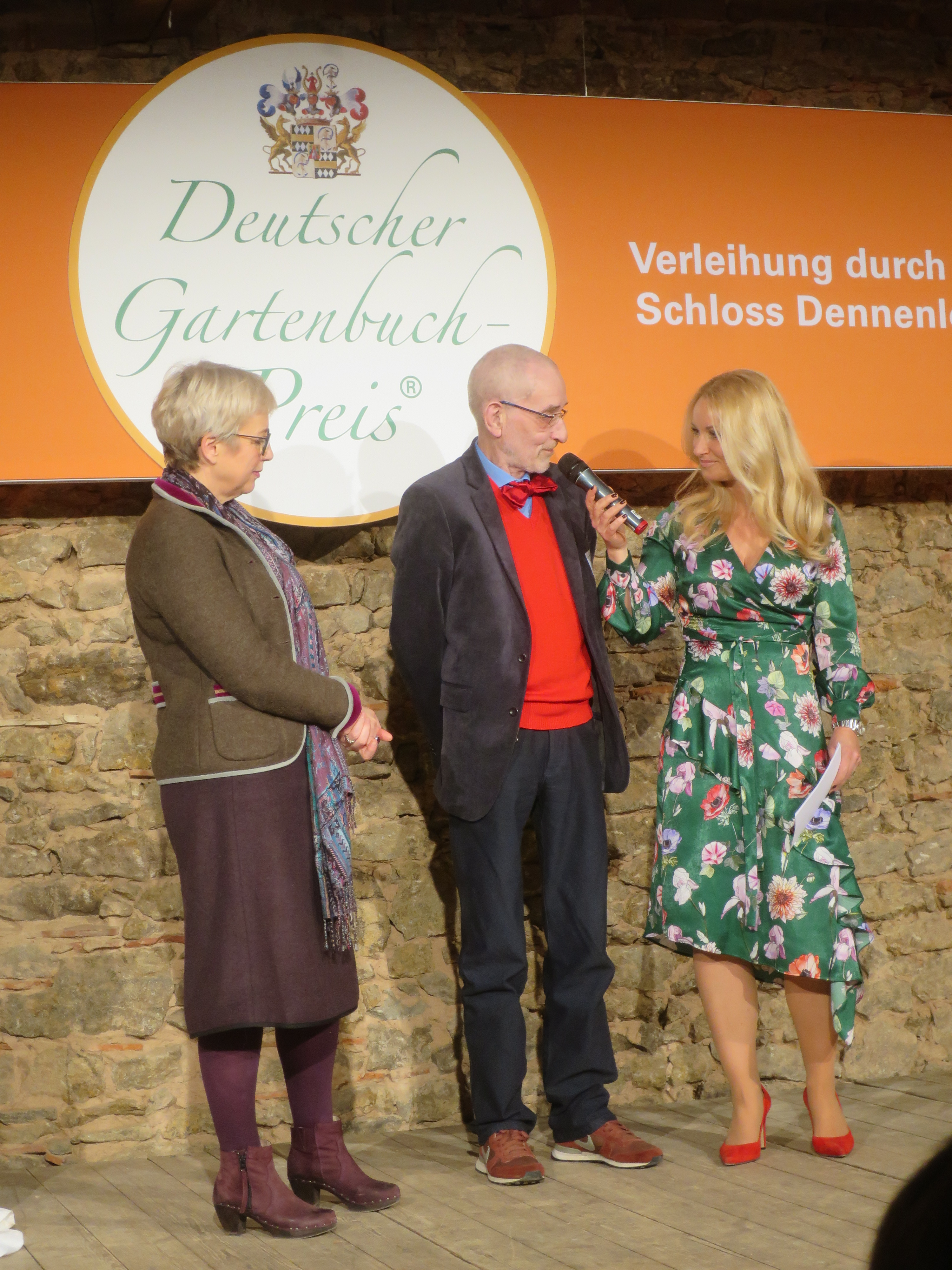 Ferdinand Werner bei der Verleihung des Deutschen Gartenbuchpreises 2018